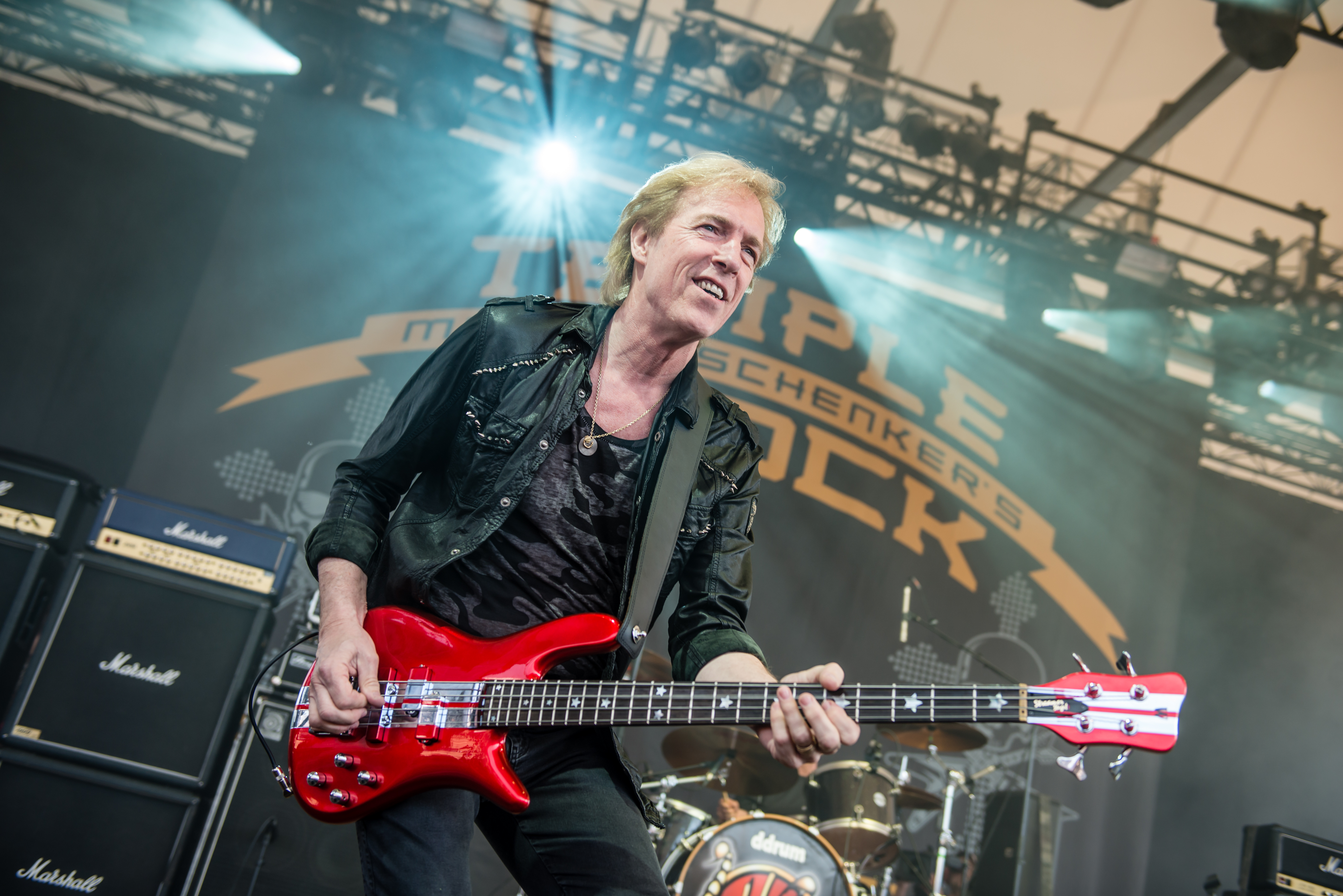 'Rock Hard Festival 2015; Gelsenkirchen Amphitheater': ' Michael Schenker's Temple of Rock'